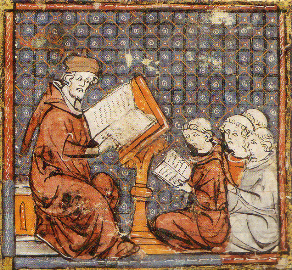 Cours de philosophie à Paris Grandes chroniques de France